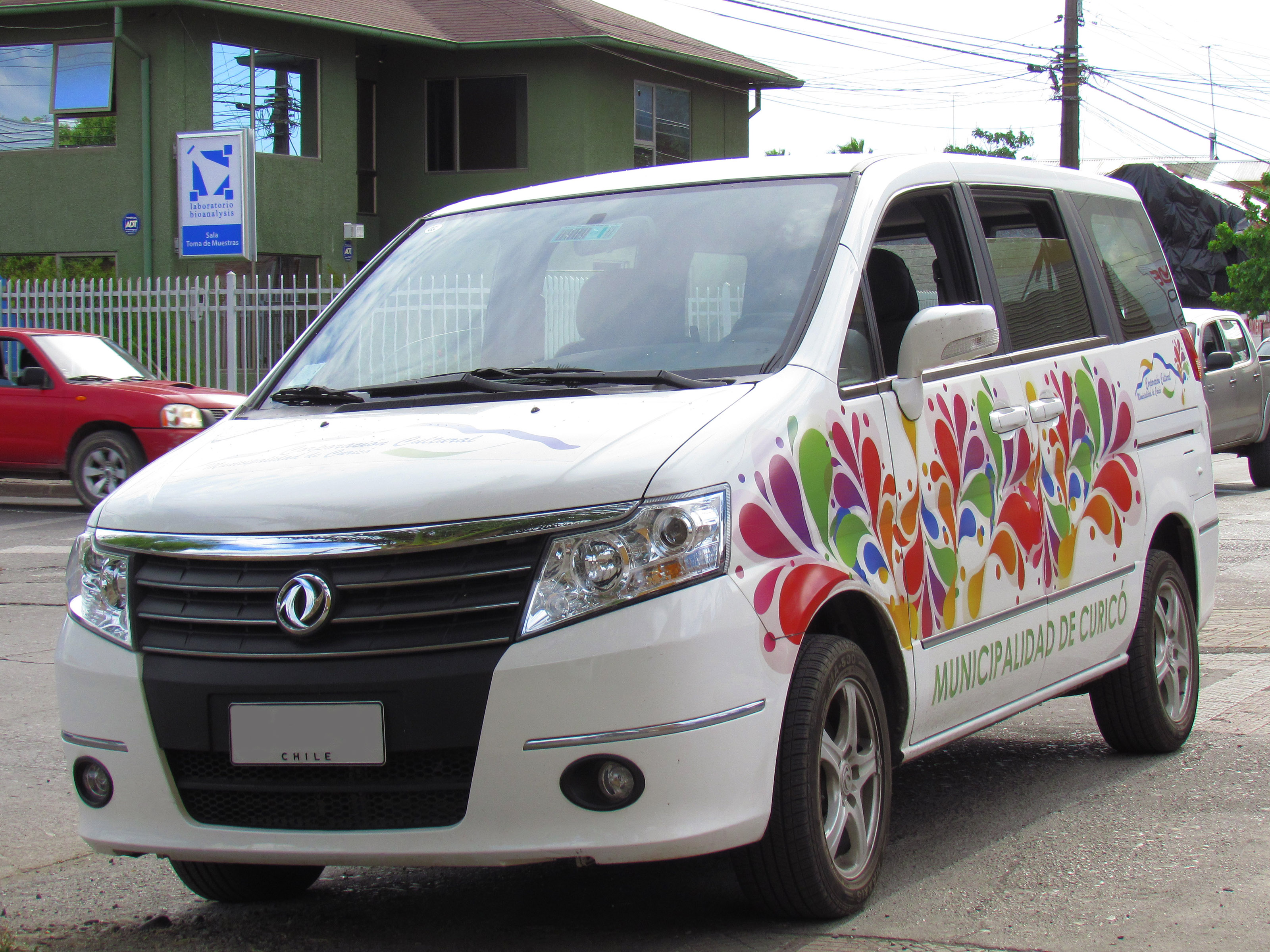 Rebadged Nissan minivan